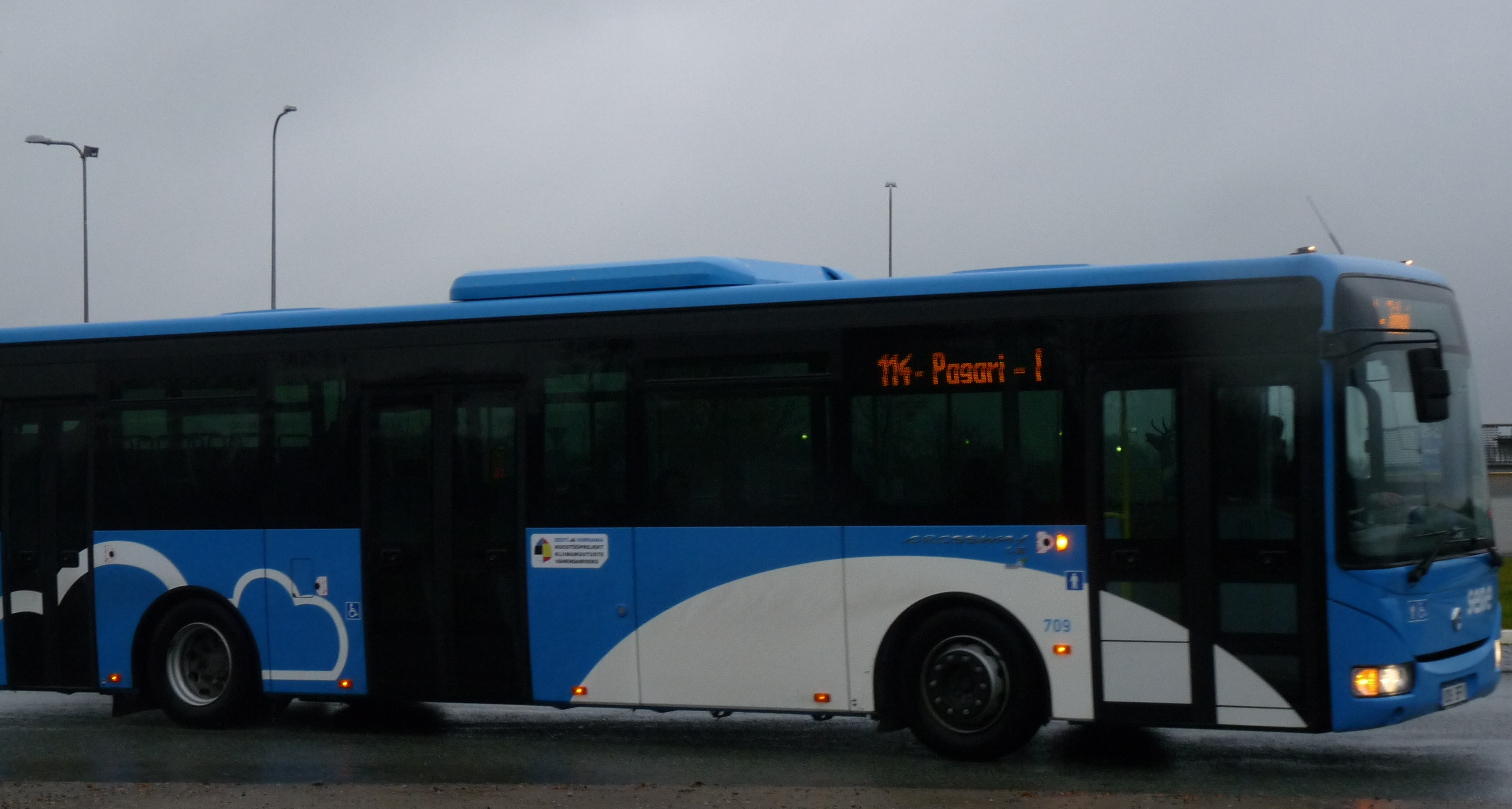 Ida-Viru maakonnaliini buss, 4. november 2012